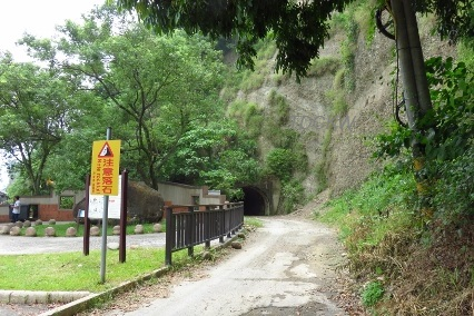 高雄市六龜第六隧道 was filmed by TDCKW on 20170906